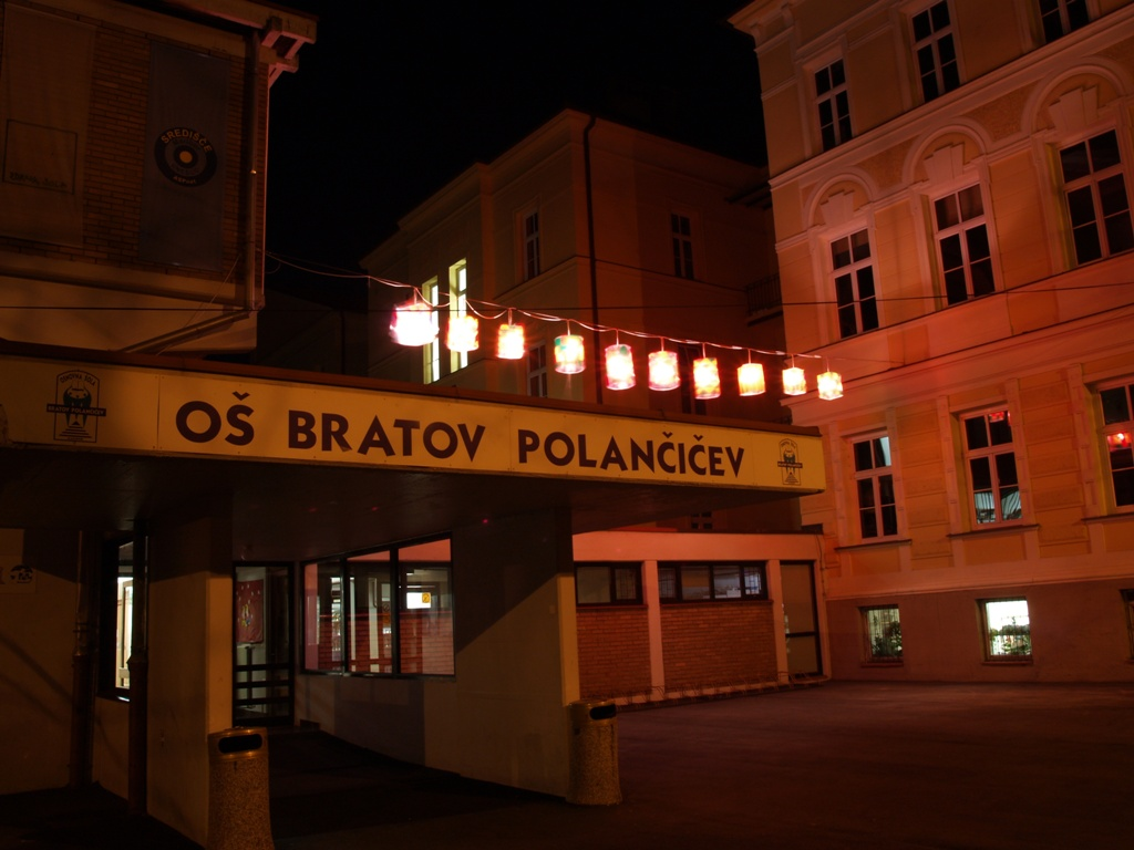 Praznično okrašen vhod v Osnovno šolo bratov Polančičev Maribor.